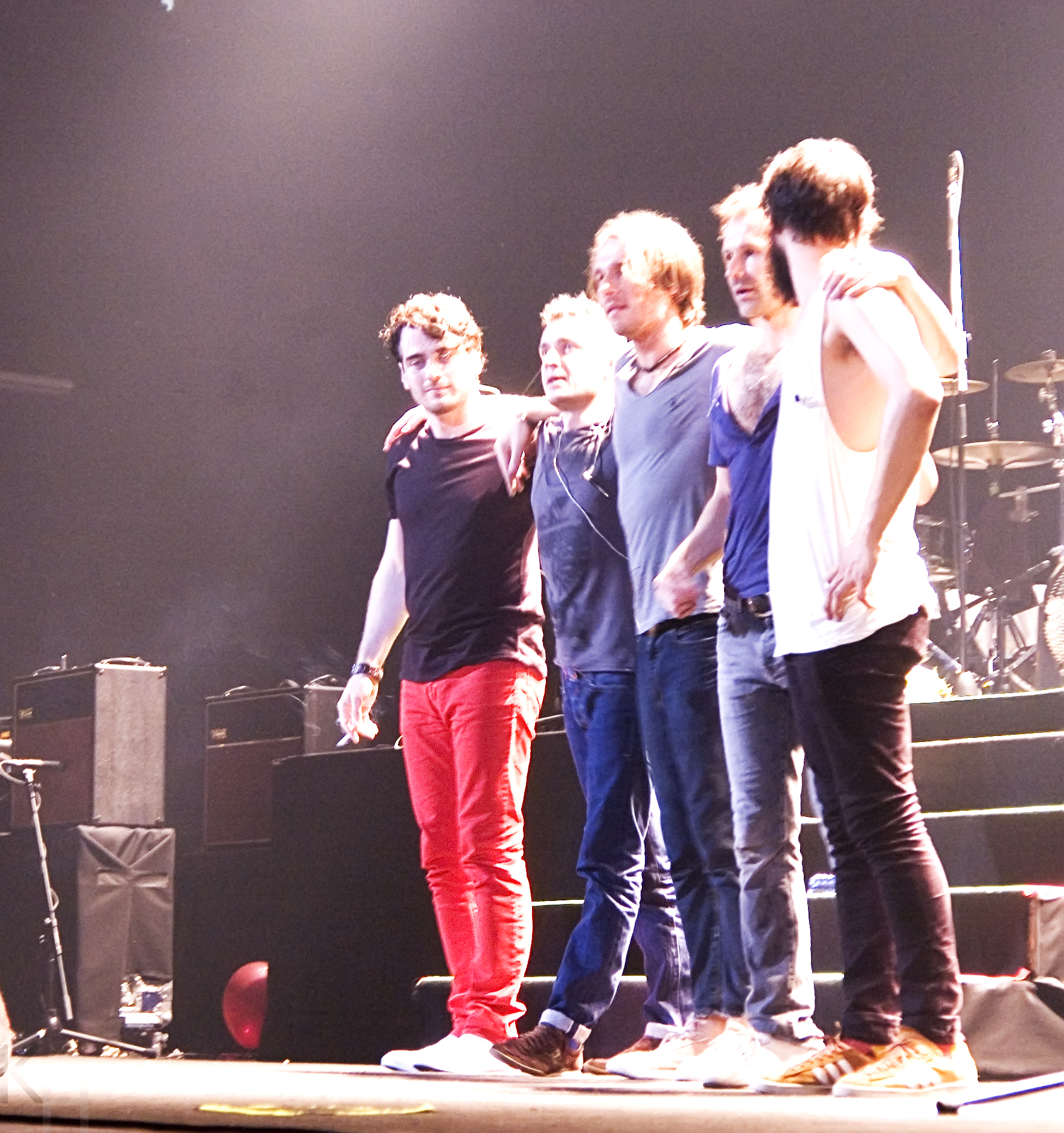 Океан Ельзи в Москве. 15 июня 2012 года. Концерт в Stadium Live. Ленинградский проспект, дом 80, корпус 17.